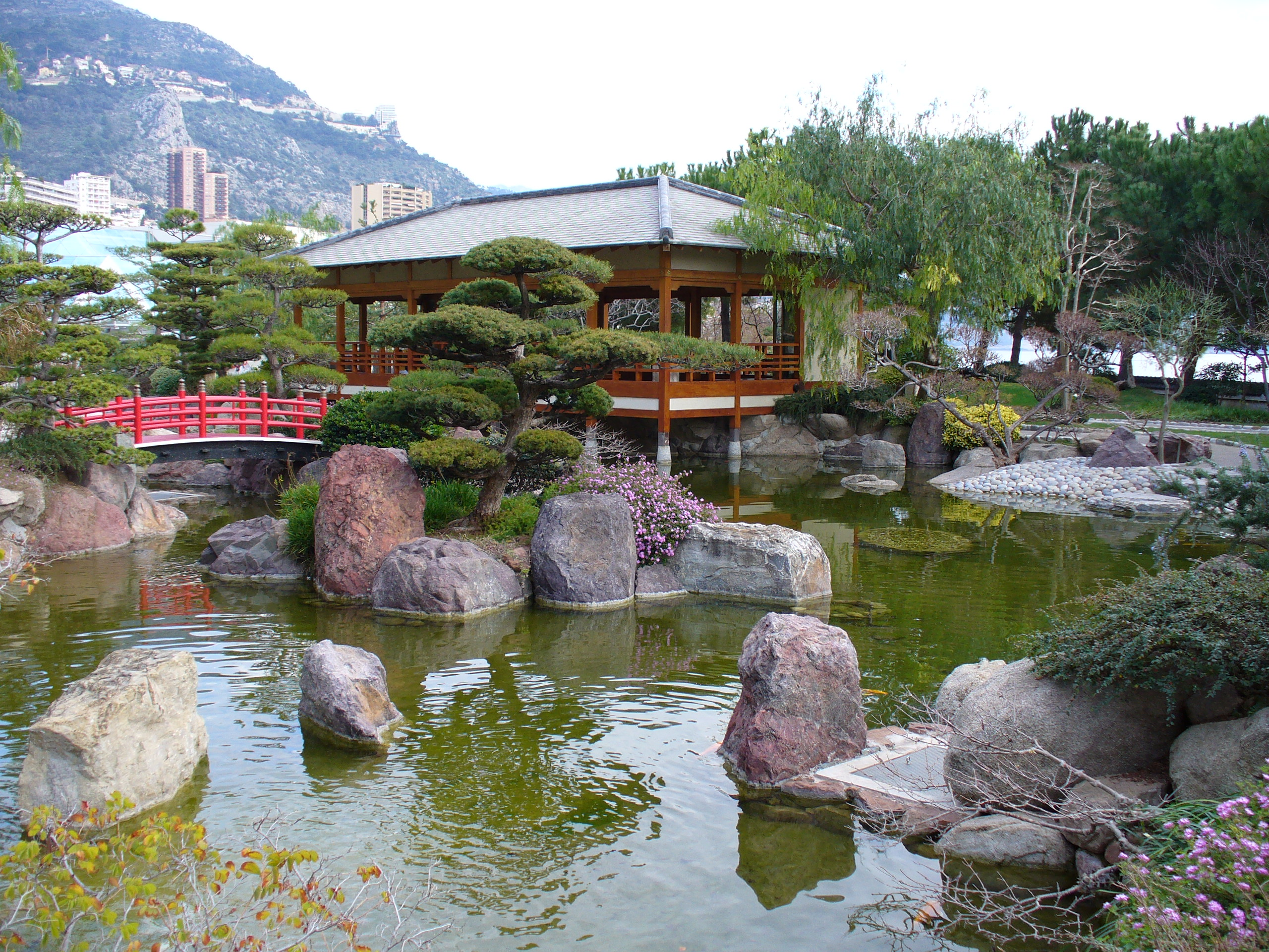 Jardin japonais de Monaco